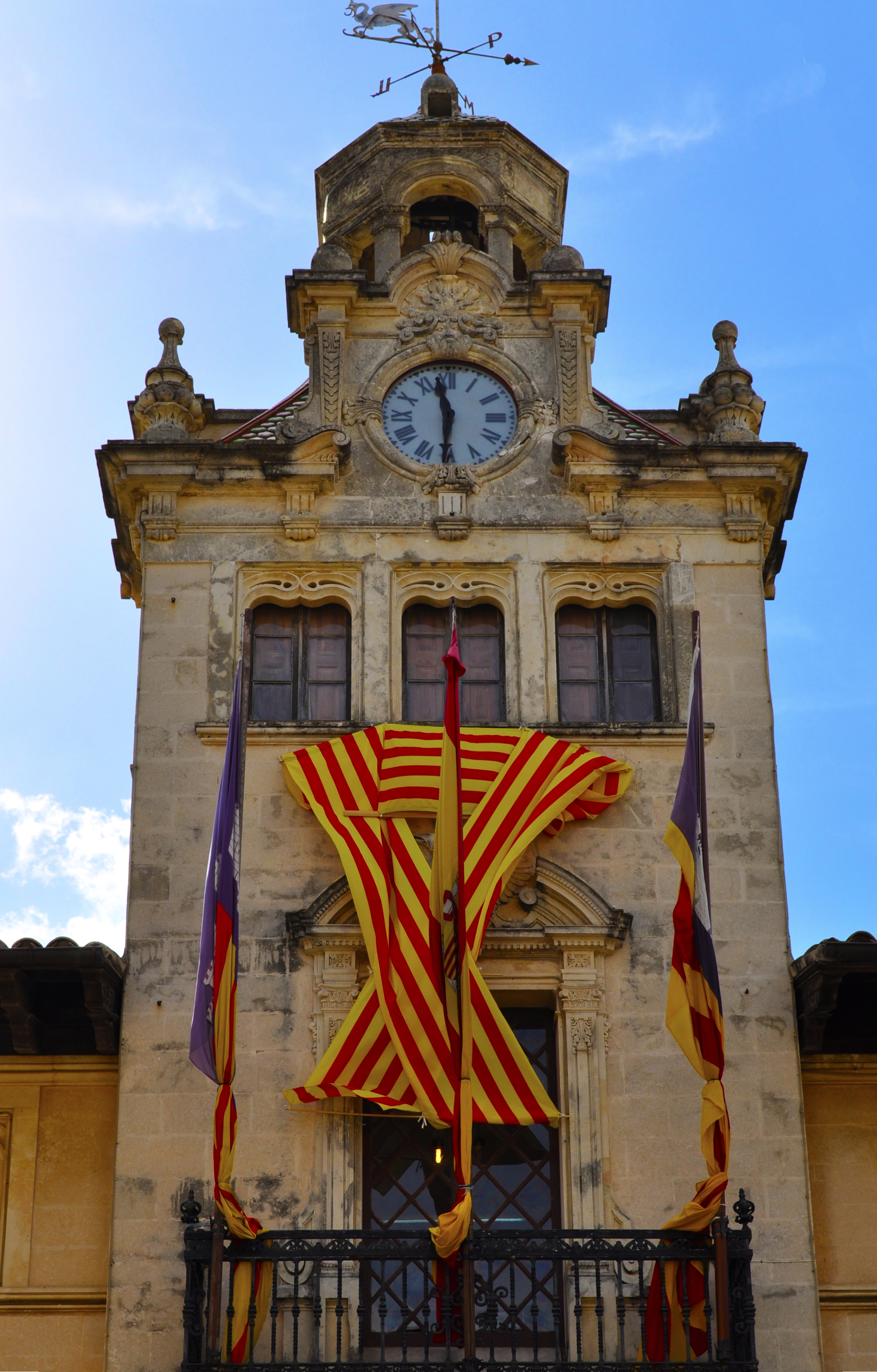 Ayuntamiento,Rathaus,ภาพจากศาลากลางจังหวัด,City Hall, 2012, Alcúdia, Balearen, Spanien DSC3342